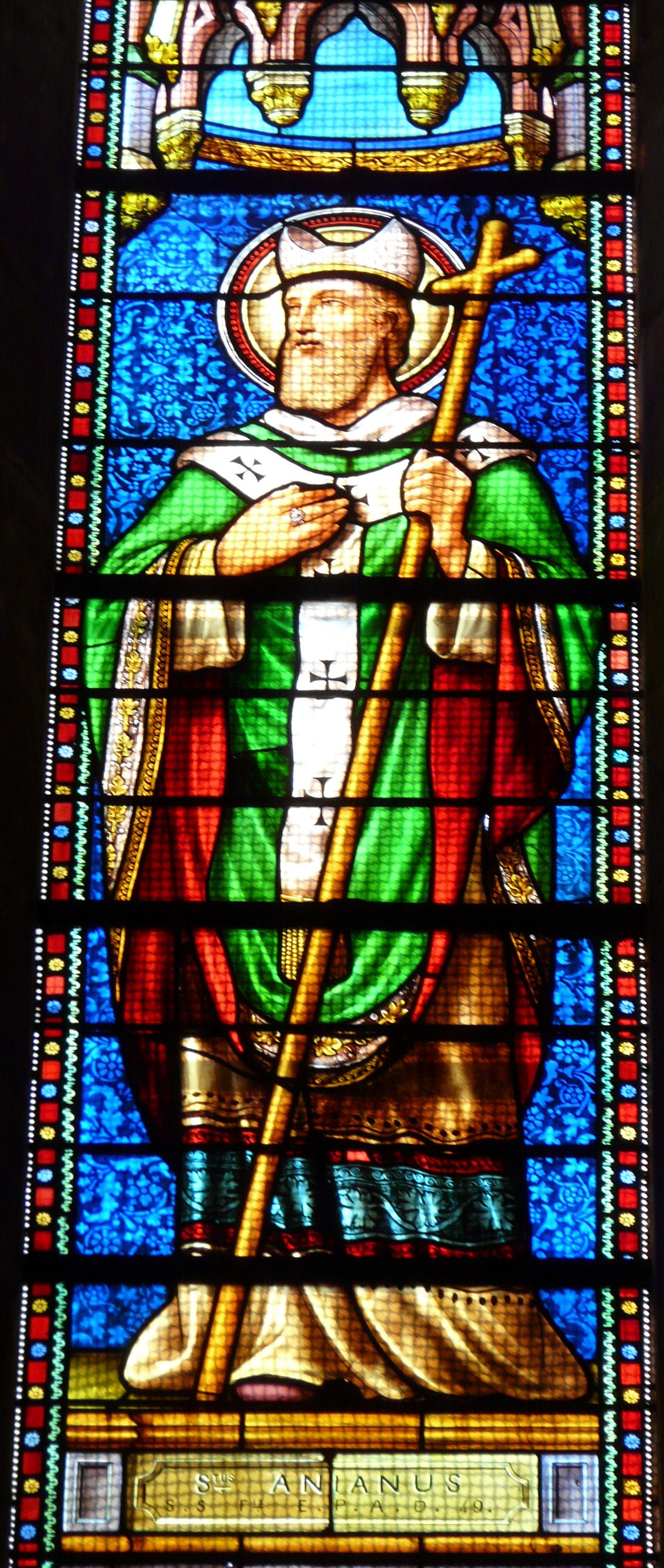 Représentation de saint Anianus, détail d'un vitrail de la nef, église Saint-Georges, Périgueux, Dordogne, France.